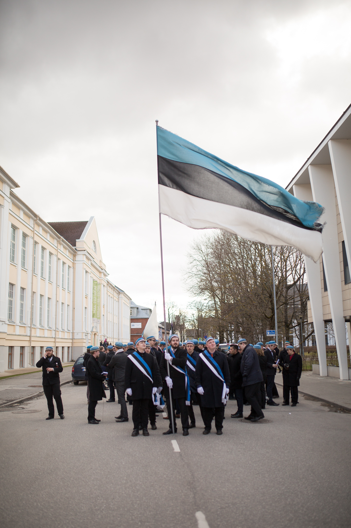 Eesti Üliõpilaste Seltsi liikmed ootamas üliõpilasorganisatsioonide rongkäigu algust 2017. aastal volbril.